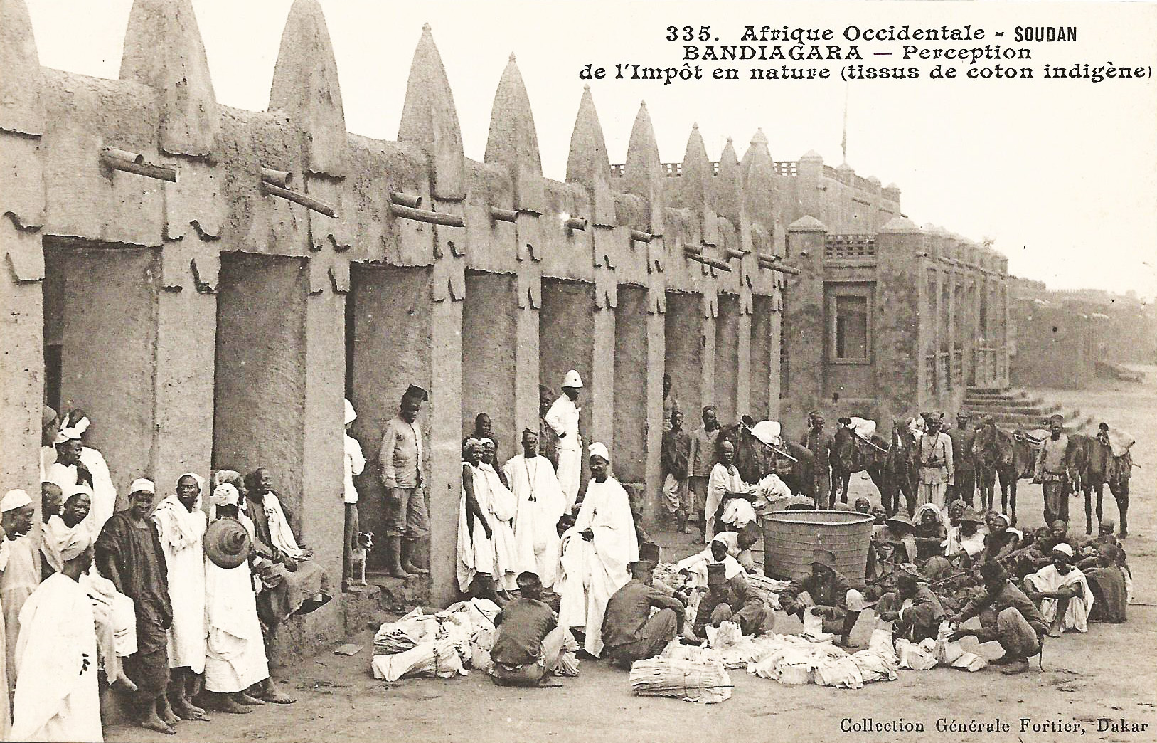 François-Edmond Fortier, Bandiagara. Perception de l'impôt en nature (tissus de coton indigène). Afrique Occidentale - Soudan.